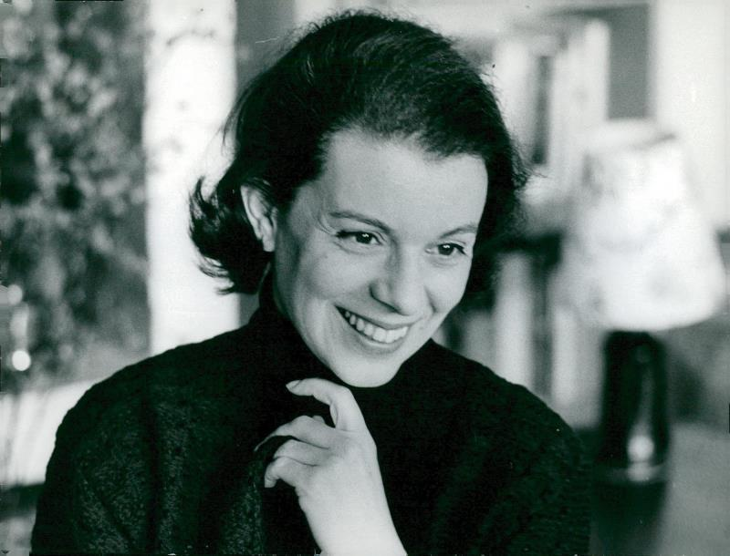 Foto på Jane Friedmann infört i Svenska Dagbladet 1965-04-12 s. 12.